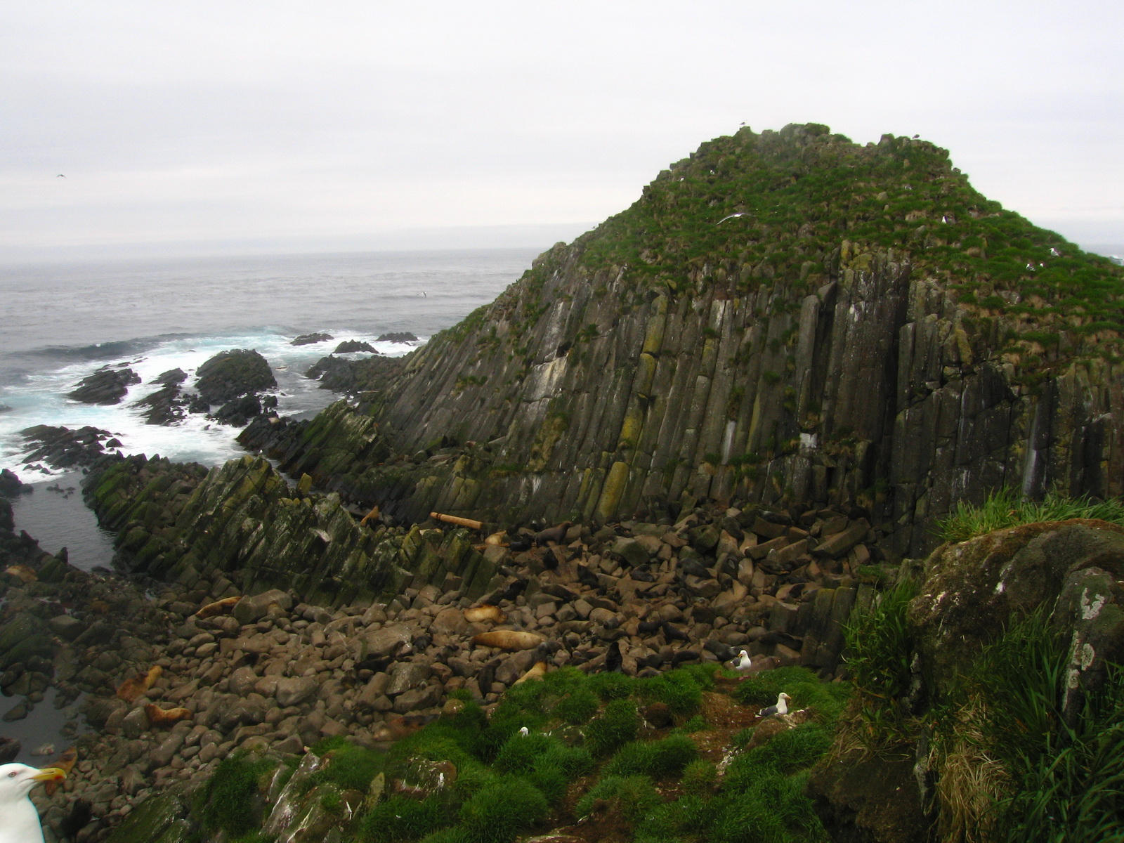 Dolgaya Rock, Lovushki Islands, Kuril Islands, Russia